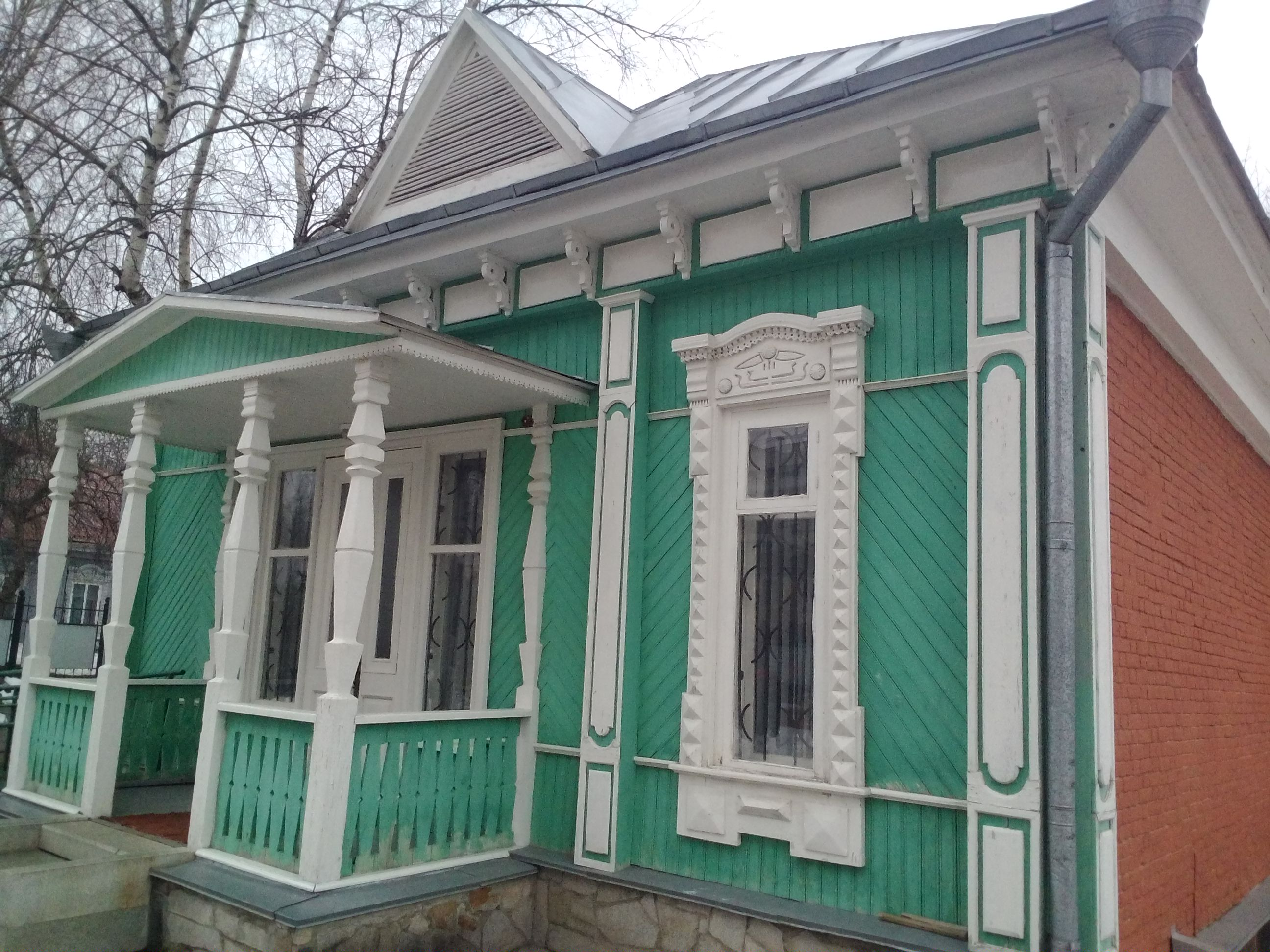 Дом, в котором жил и работал поэт Мажит Гафури: улица Гоголя, 28, Уфа, Башкортостан